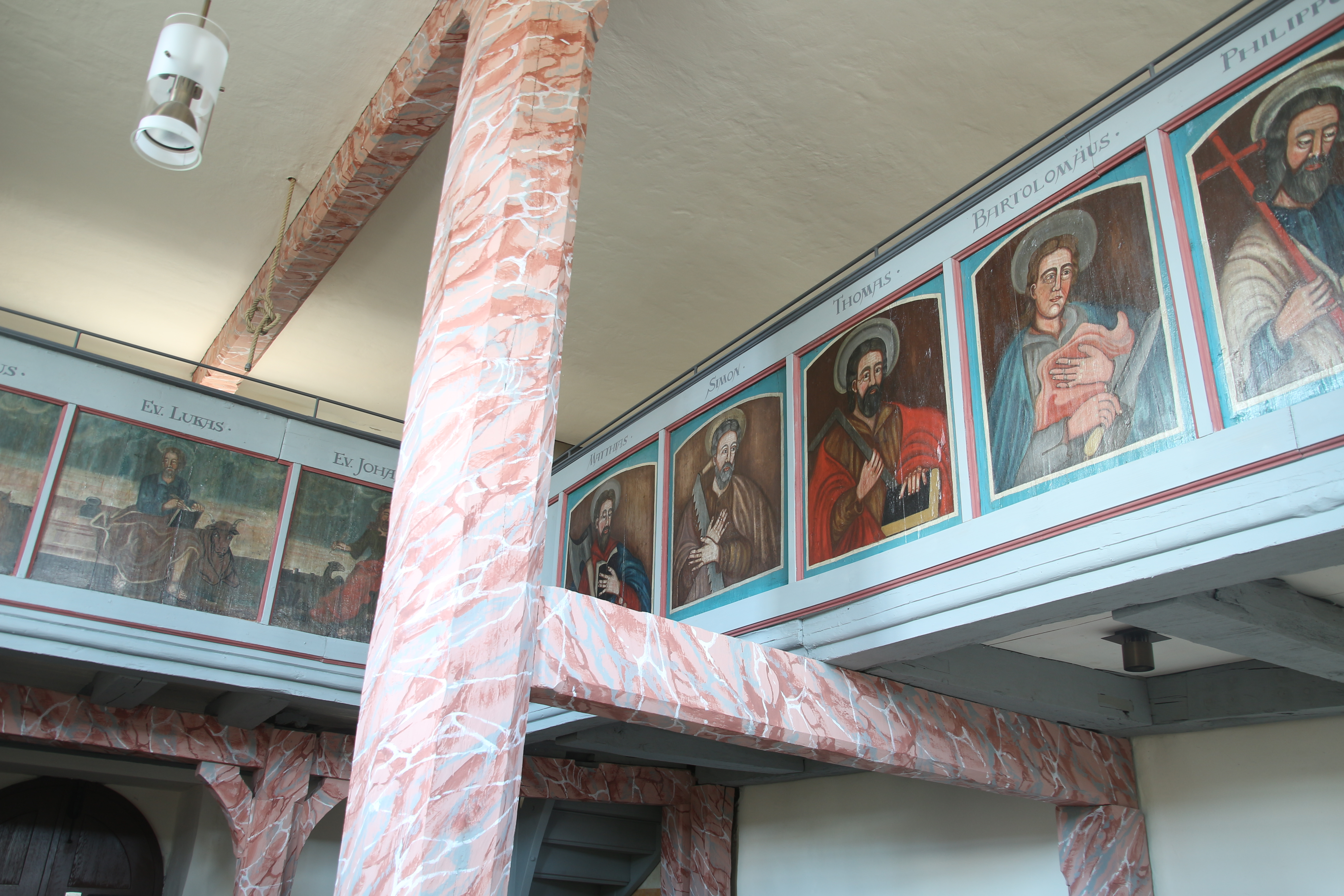 Evangelische Kirche Unter-Lais, Gemeinde Nidda, Wetteraukreis, Hessen